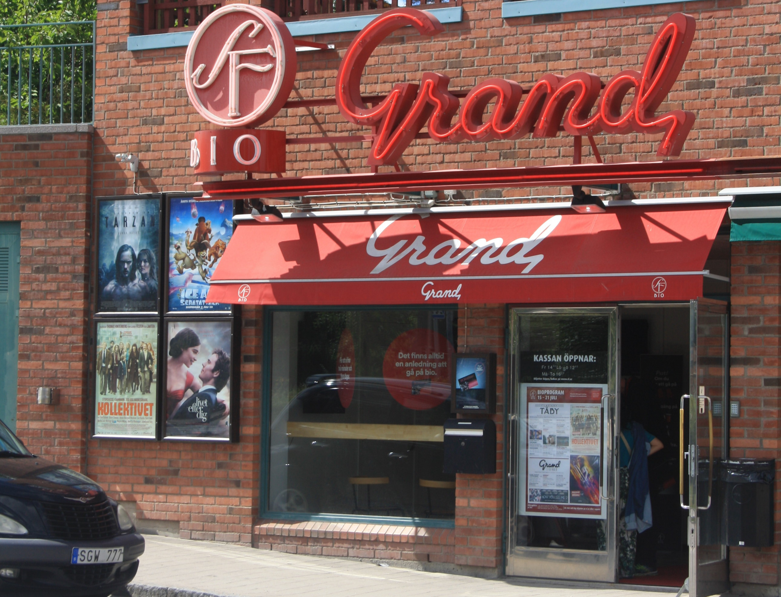 Biografen Grand i Lidingö